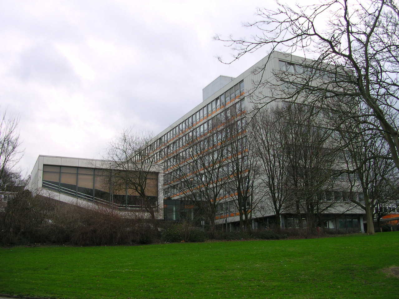 RWTH Aachen, Sammelbau Bauingenieurwesen mit Hörsälen (rechts)